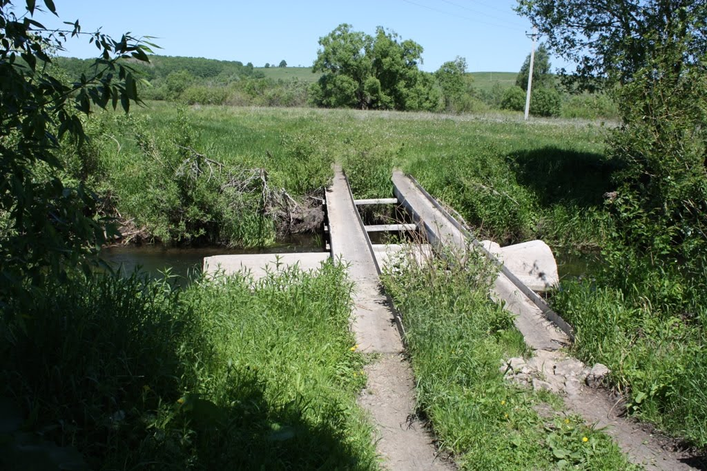 Мост через реку Сиалей, в селе Сиалеевская Пятина